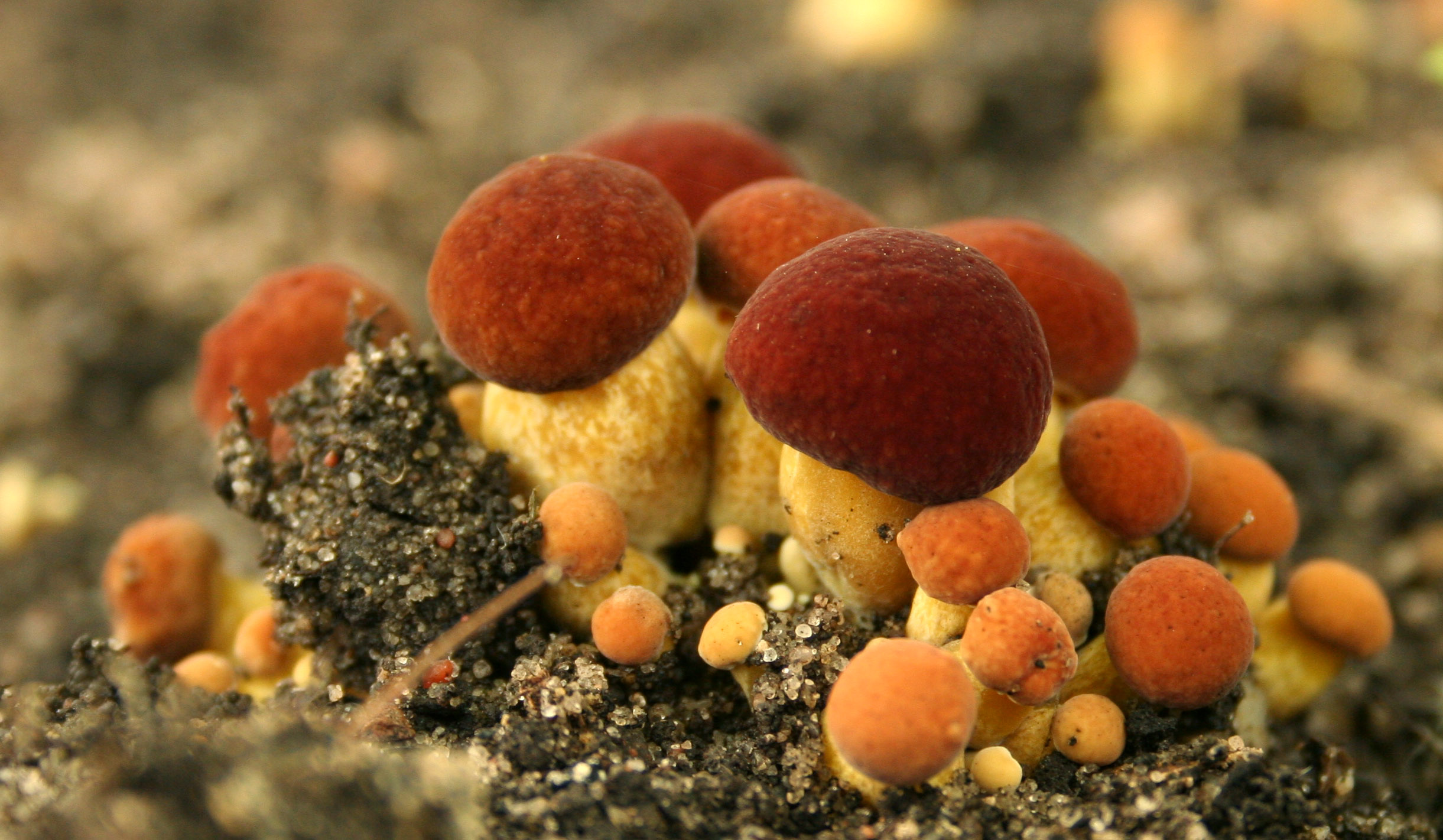 Xerocomellus engelii